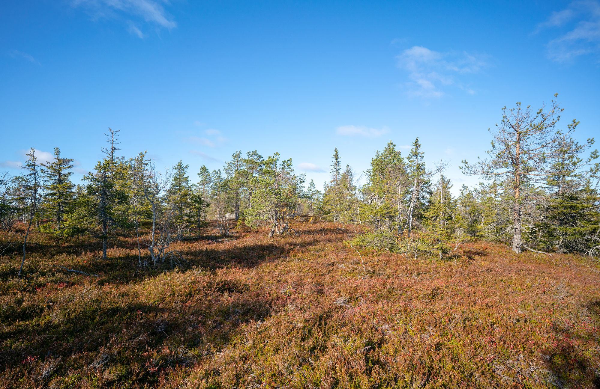 Topplatån på det 578 meter höga berget Gammtratten.